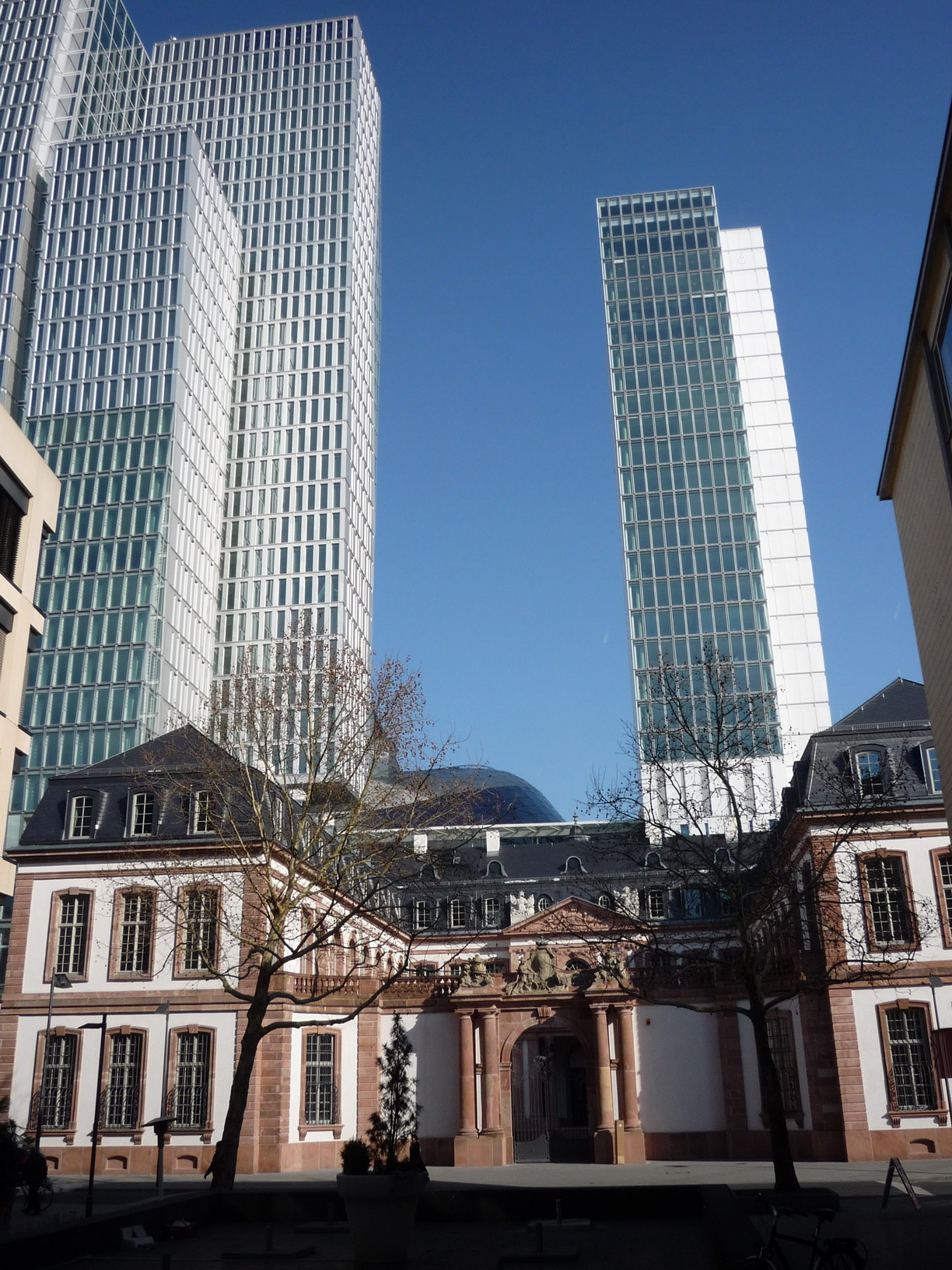 Palais Turn und Taxis in Frankfurt. Dahinter das Hochhaus und Einkaufszentrum „My Zeil“